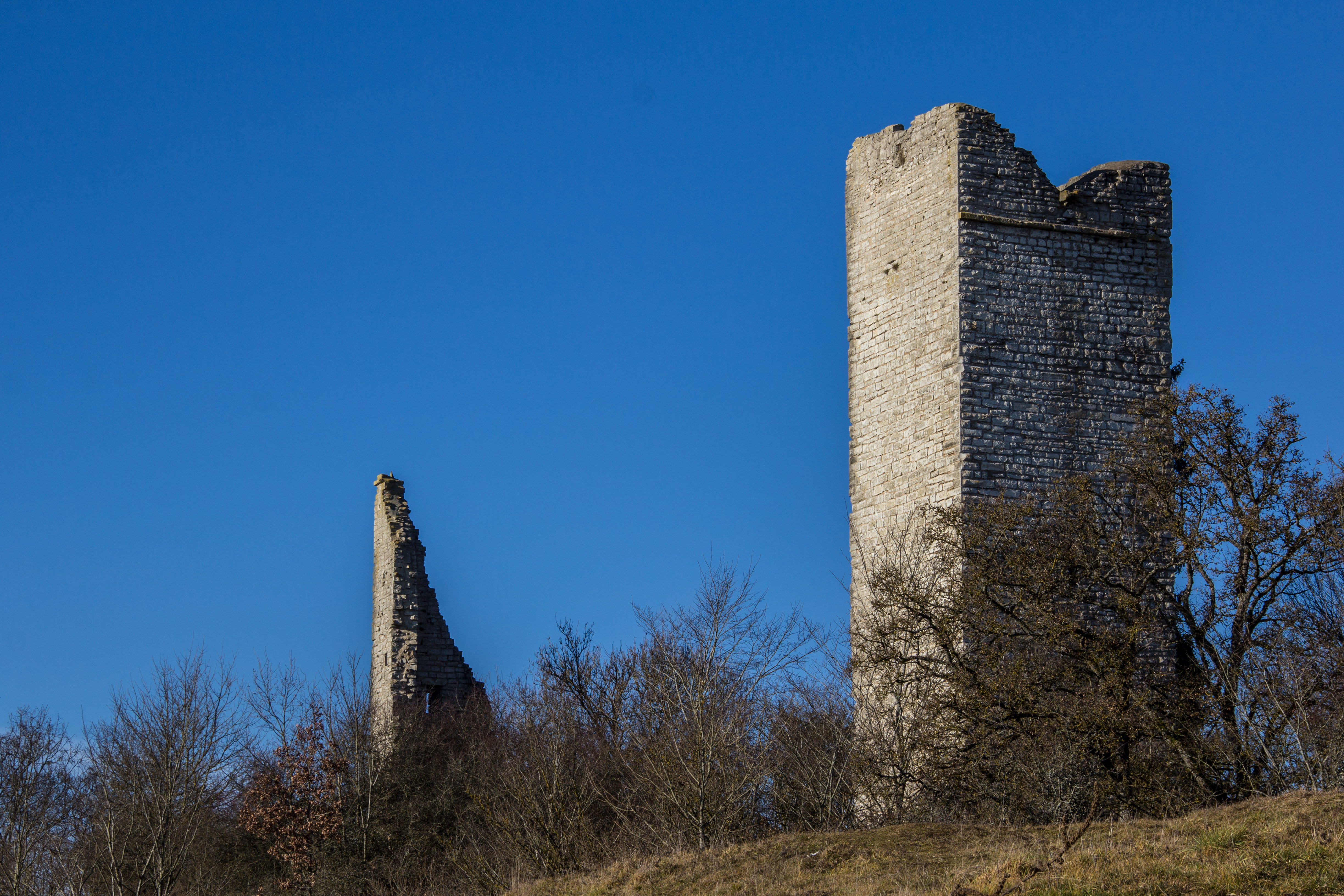 Burg Bechthal, Bechthal